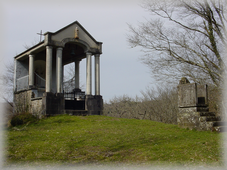 La Chapelle de Saint Marien près d'Evaux les Bains (23)